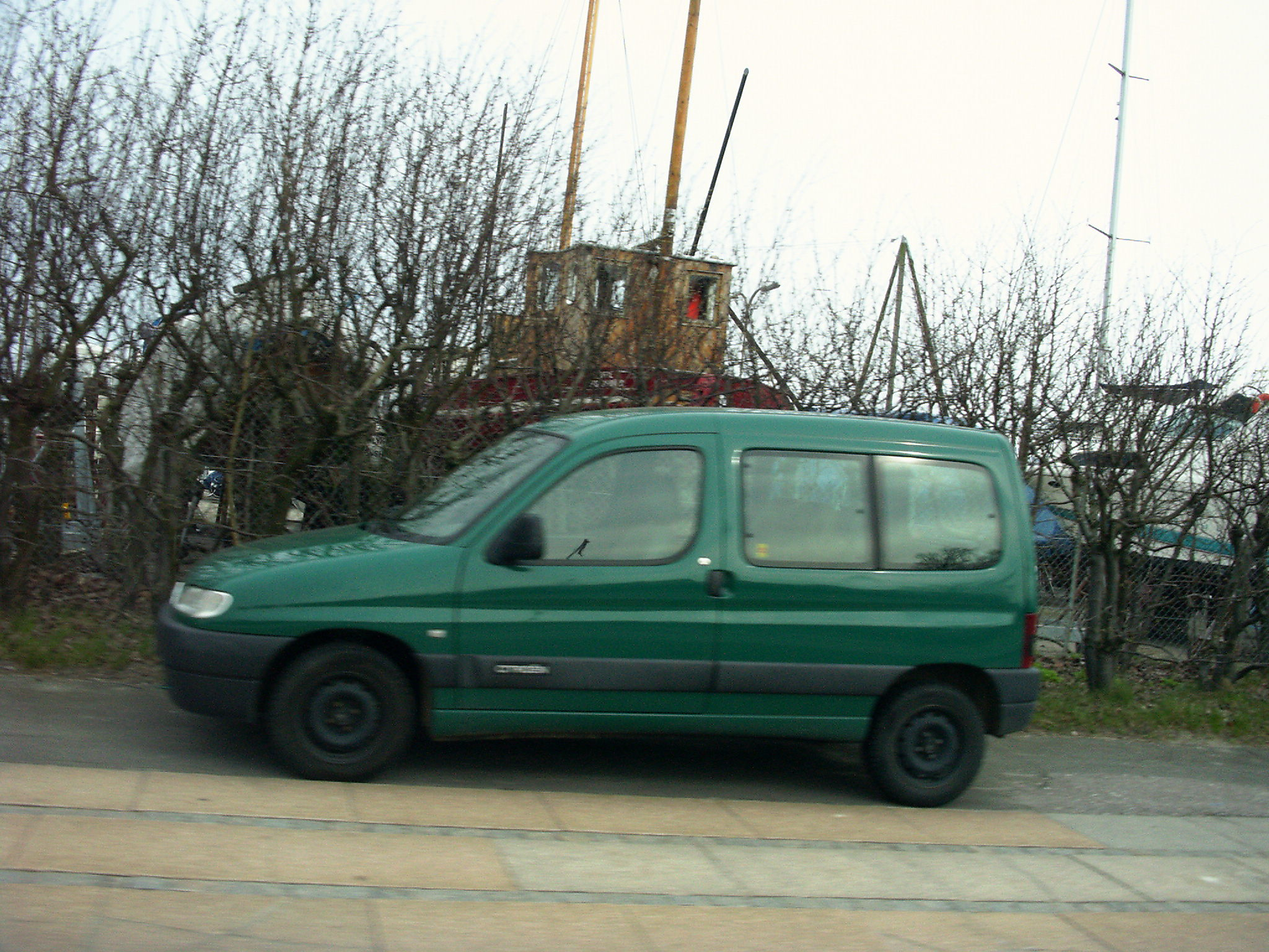 i took it myself sometime this spring. (User:Ysangkok)